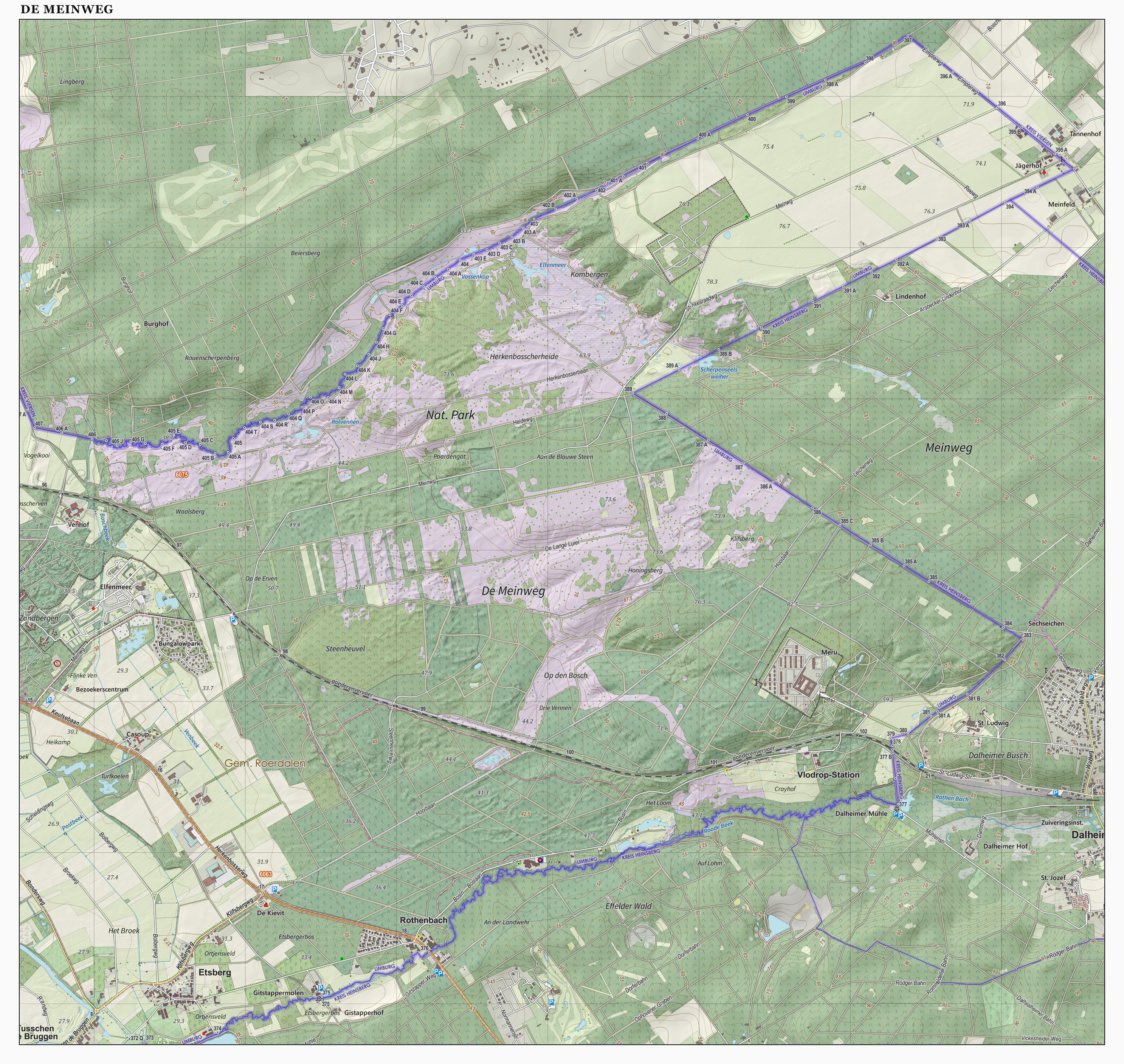 Topografische kaart van de Meinweg (natuurgebied). Resolutie: 400 pixels/km. Samengesteld door Jan-Willem van Aalst op basis van de GML open geodata van de BRT/Top10NL (basisregistratie Topografie, Kadaster), vrijgegeven door Kadaster onder de Creative Commons BY licentie. Additionele gegevens uit BAG uit de Open Street Map en uit de Risicokaart. Zie ook de Legenda.